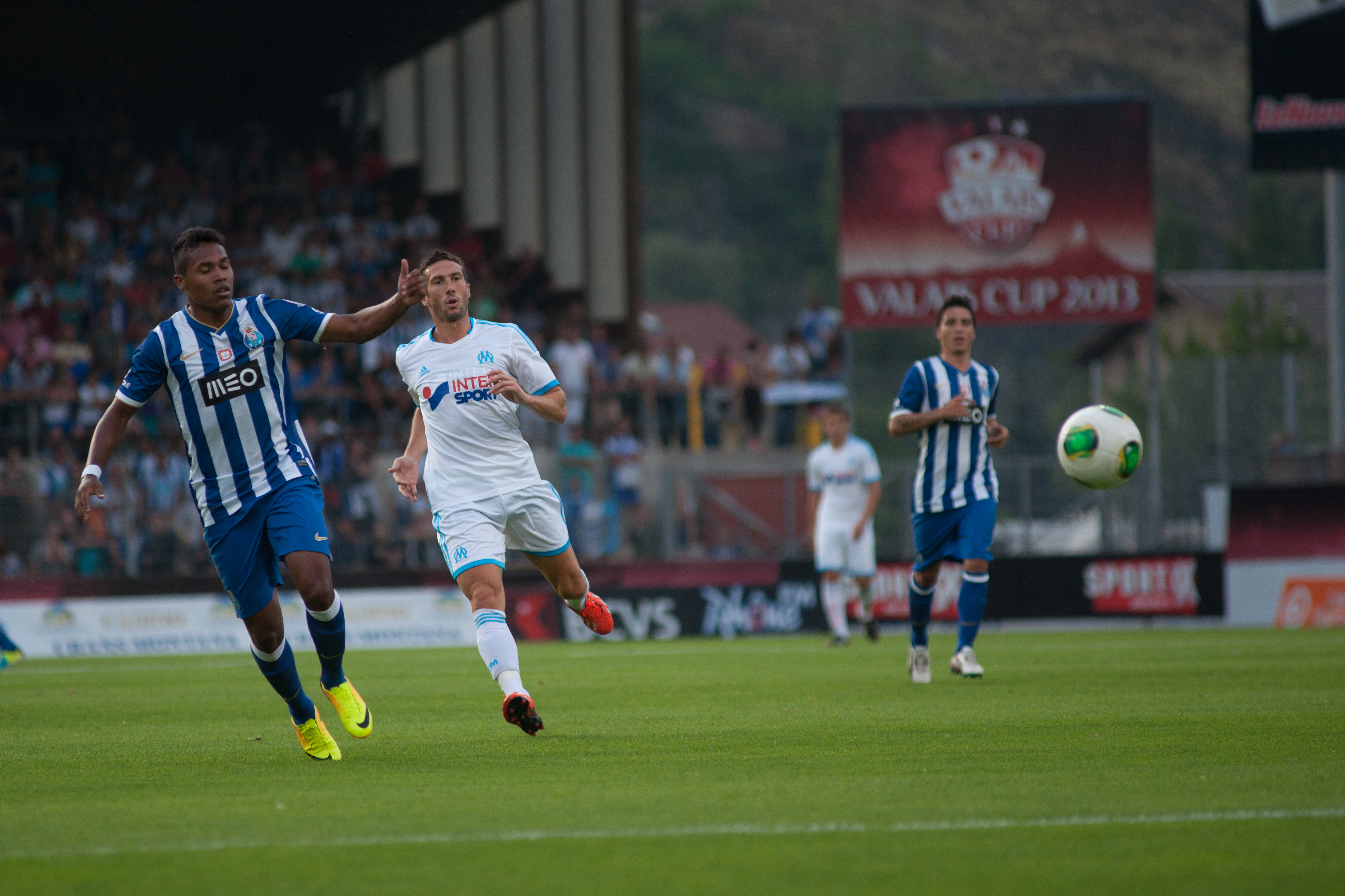 OM - FC Porto - Valais Cup 2013 - deux joueurs et ballon